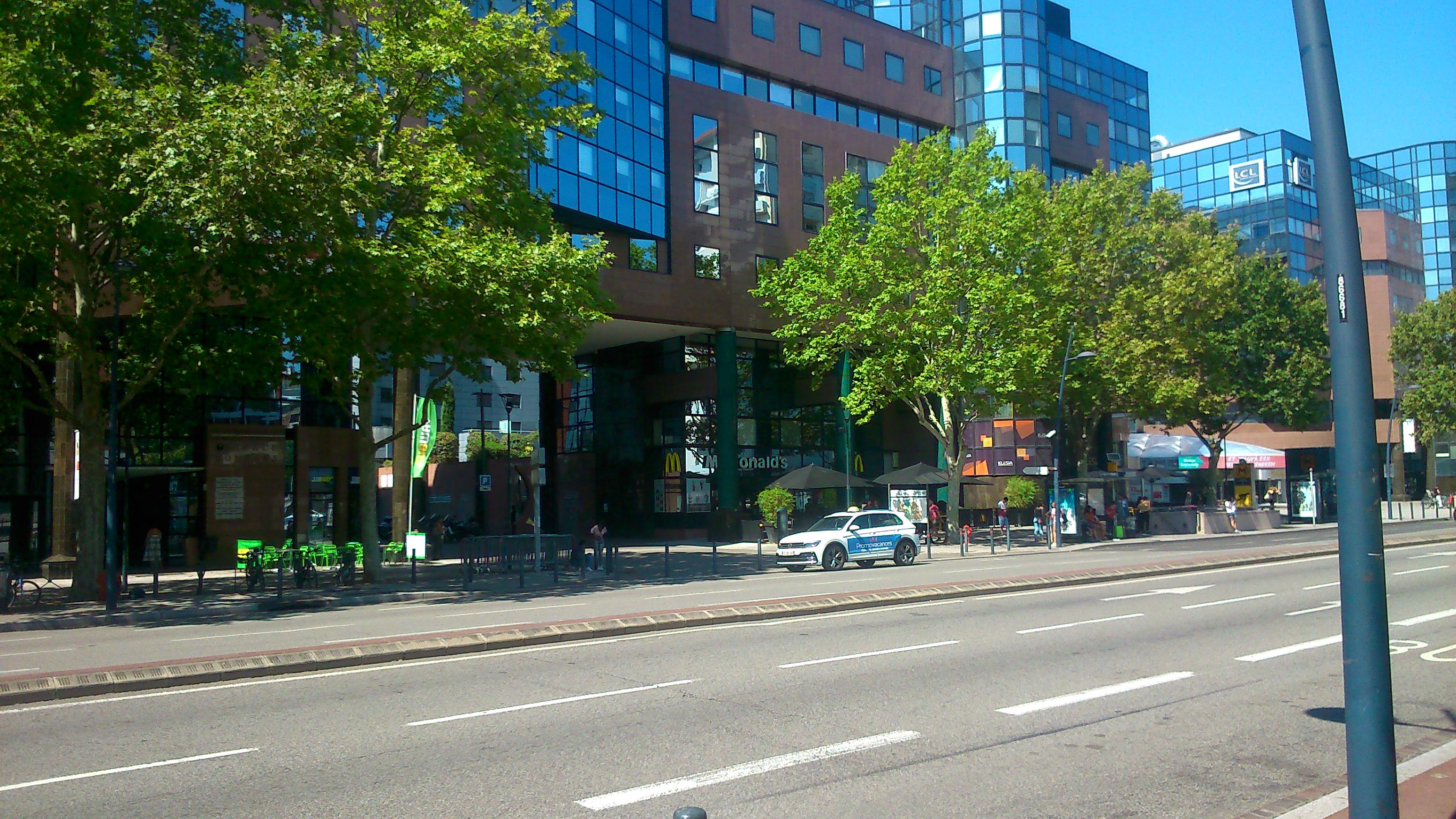 L'esplanade Compans Caffarelli à Toulouse sur le boulevard Lascrosses